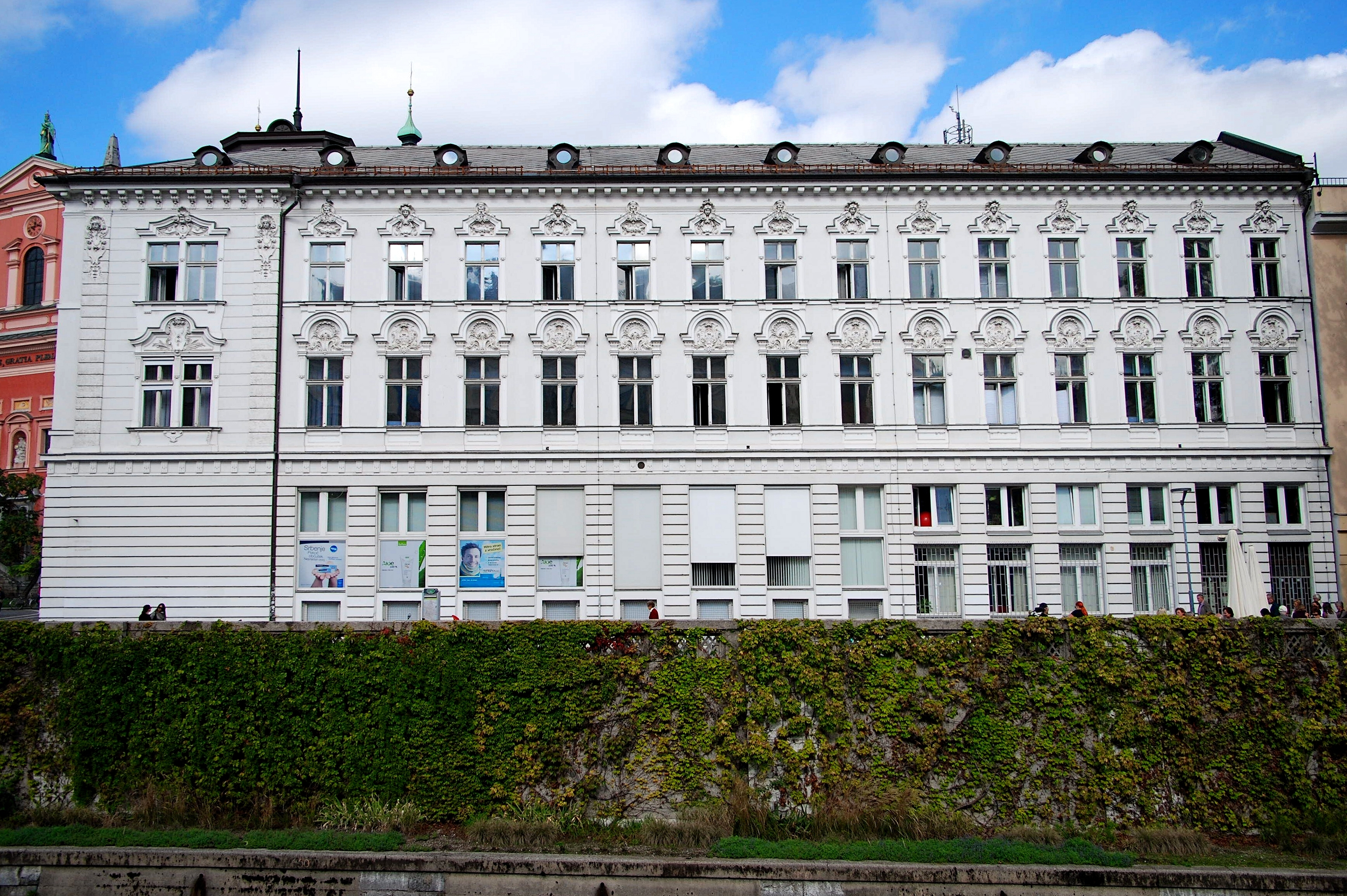 Centralna lekarna v Ljubljani. Arhitekt Ferdinand Hauser (1835-1890).